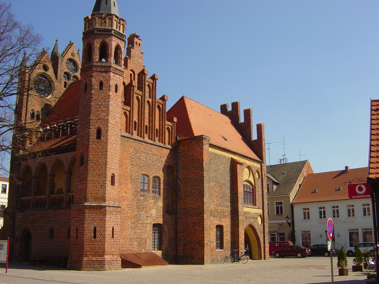 Tangermünde, Rathaus phot taken by Mazbln on April 2, 2005